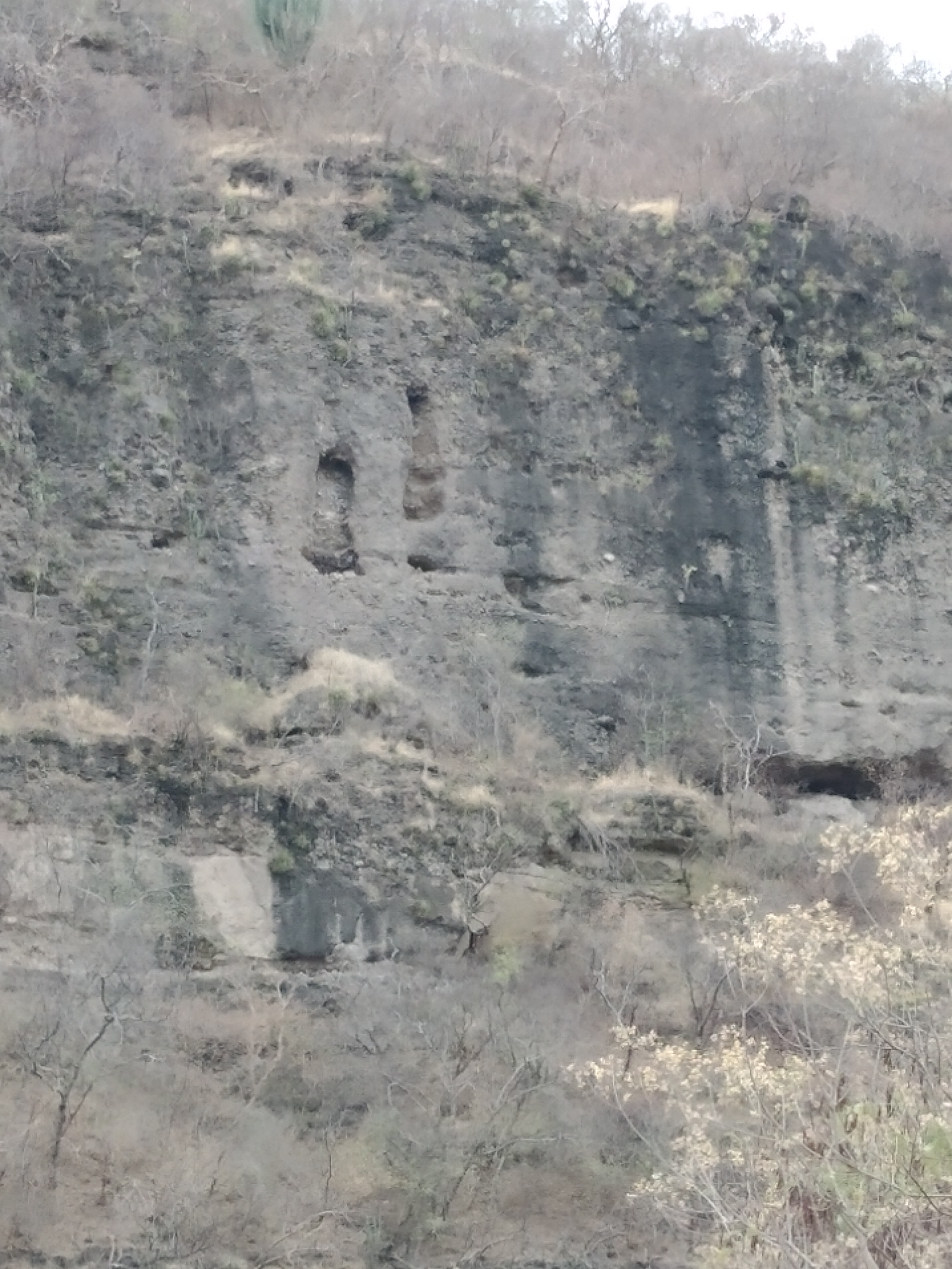 En los límites de los municipios de Múgica y Gabriel Zamora por la Carretera Federal 37, se encuentran estas marcas en la zona conocida como la "Barranca del Diablo". Según Sonia Iglesias y Cabrera[1] Las marcas fuero dejadas por San Pedro, quien buscó al Diablo por todas partes hasta que lo encontró en un sitio tan caliente como el mismo averno.